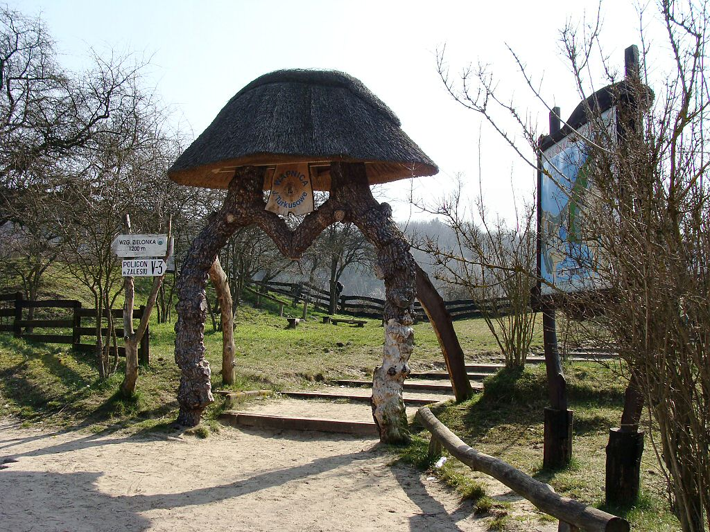 Brama nad Jeziorem Turkusowym